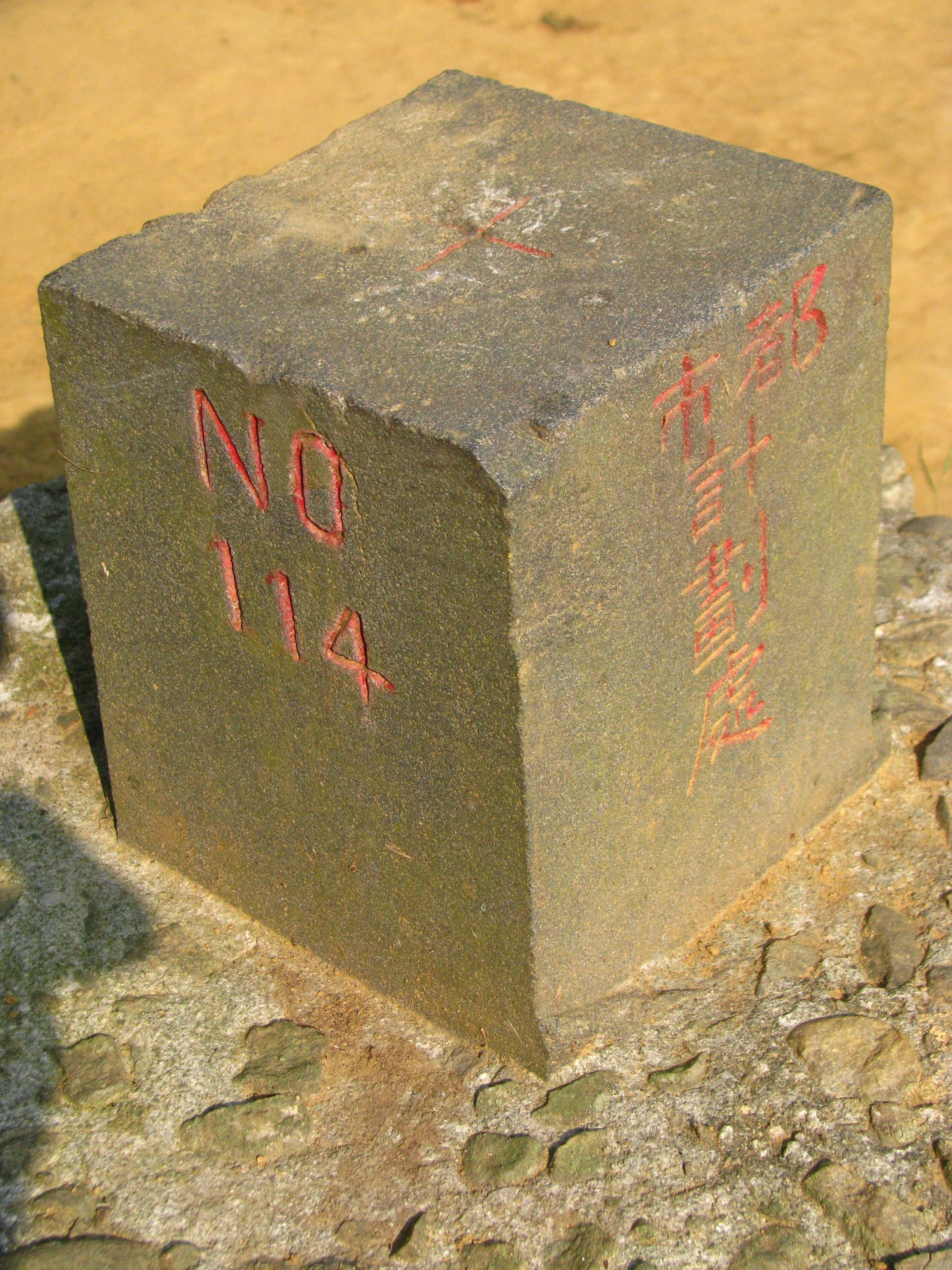 臺北市內湖區康樂山三角點。